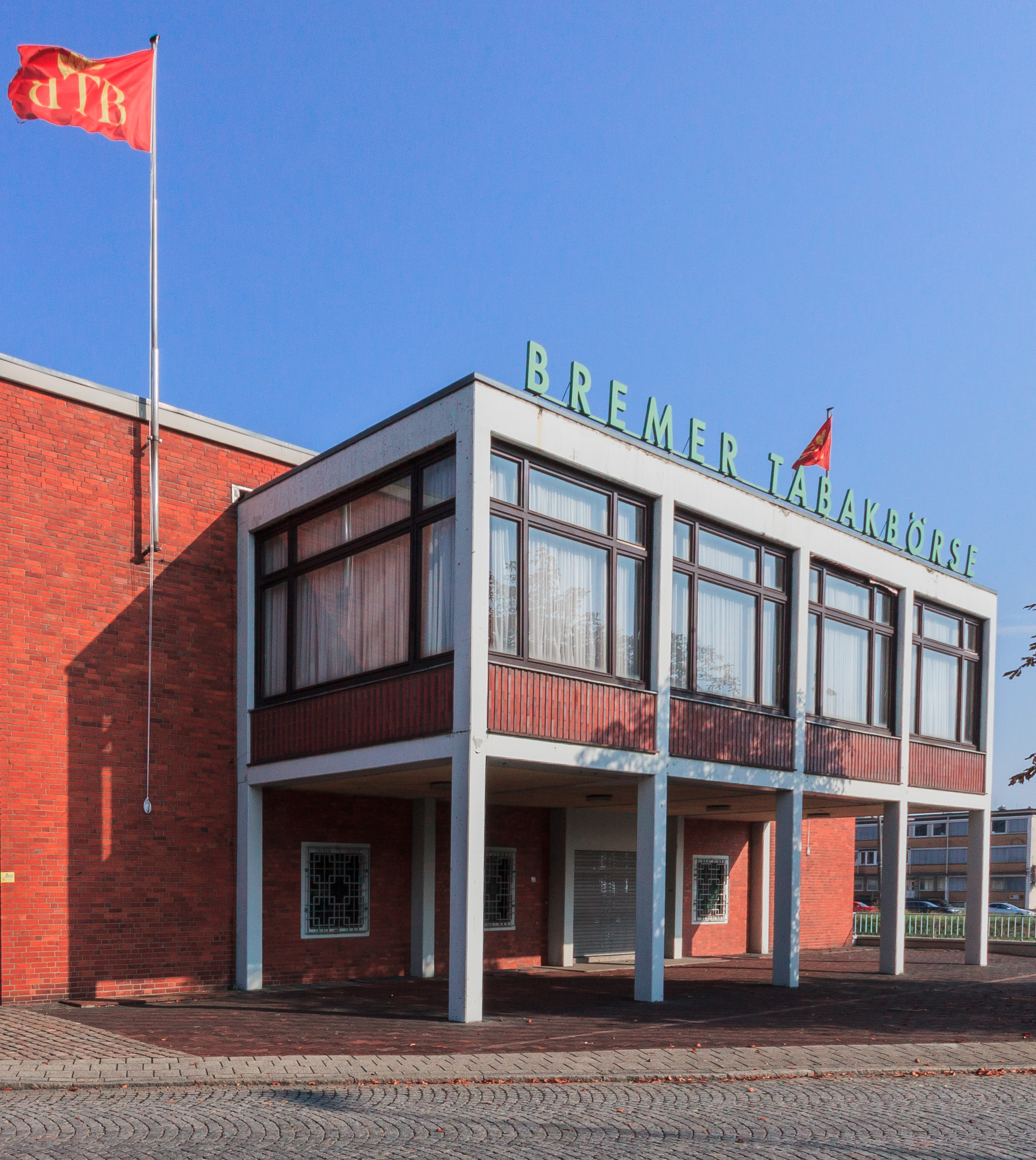 Tabakbörse in Bremen, Speicherhof 1Das abgebildete Objekt ist ein geschütztes Kulturdenkmal in der Freien Hansestadt Bremen, mit der Nr. 3478 beim Landesamt für Denkmalpflege registriert.